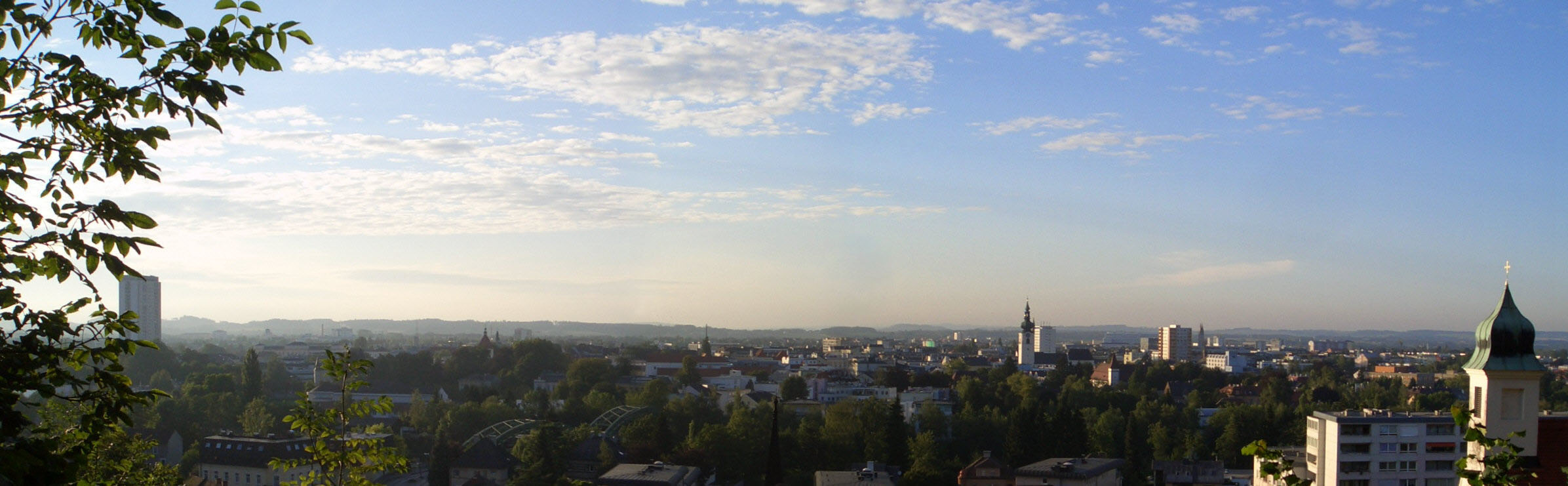 Die Stadt Wels von der Marienwarte aus, mit PhotoStitch aus eigenen Bildern zu einem Panoramafoto zusammengefügt